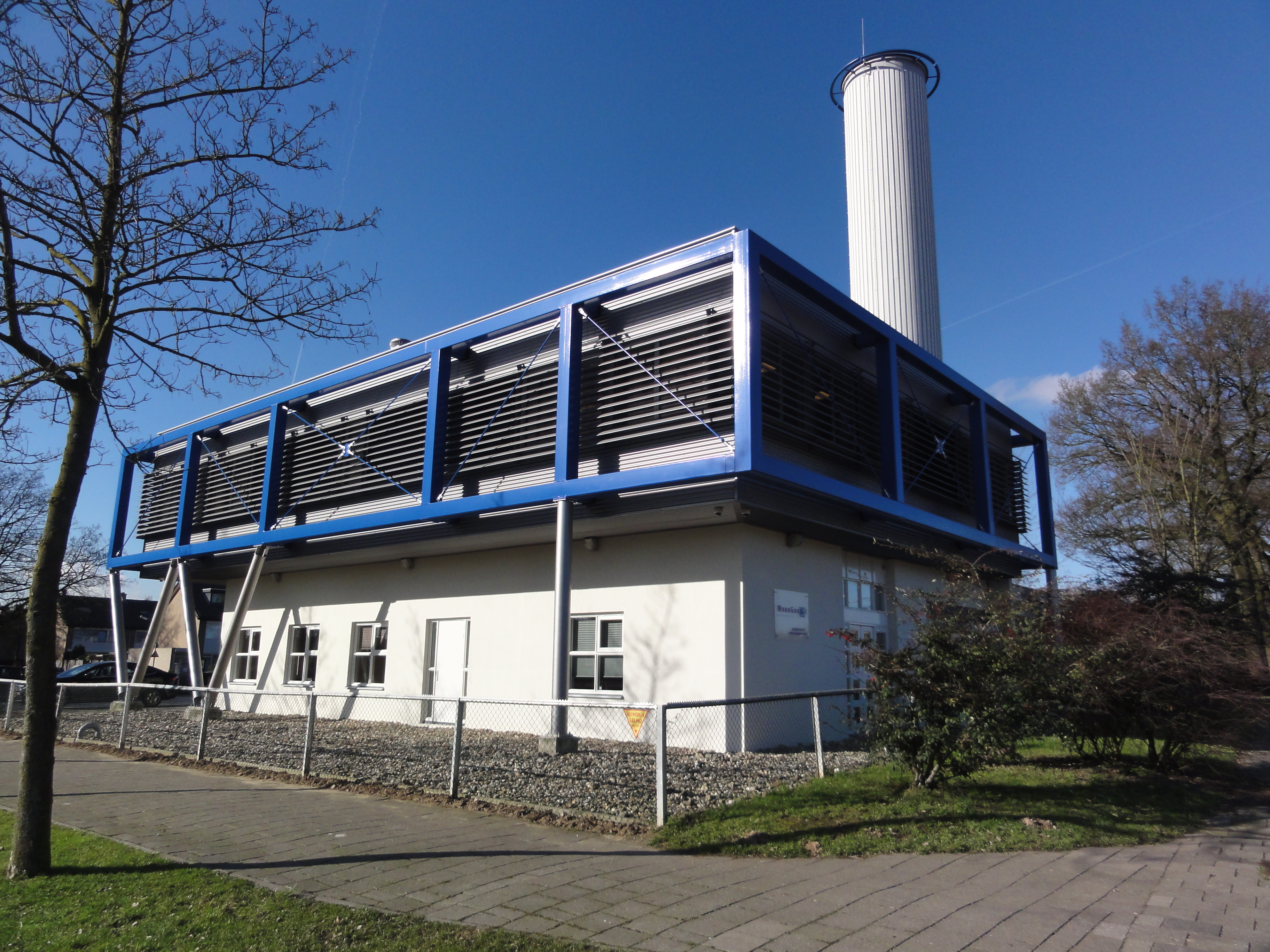 Nijmegen Dukenburg, voormalig ketelhuis stadsverwarming Aldenhof. Bij de aanleg van de nieuwe wijk Aldenhof in stadsdeel Dukenburg (1966) werd gekozen voor centrale wijkverwarming. Dit gaf veel problemen en is na enige jaren afgesloten. Het gebouw is na de eeuwwisseling vernieuwd en vergroot, maar de schoorsteen is als gedenkteken behouden en markeert de ingang van Aldenhof.